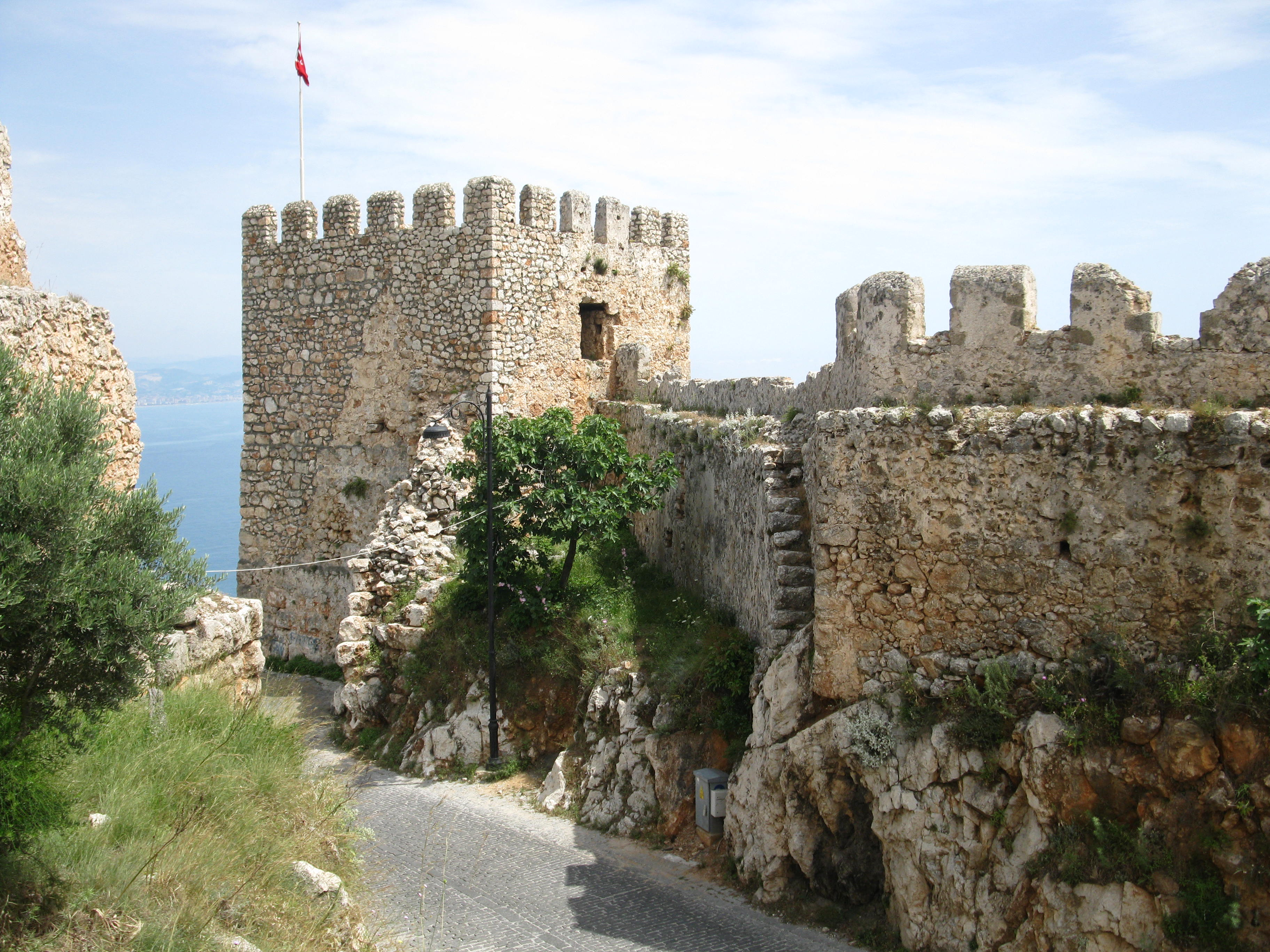 Zamek w Alanii